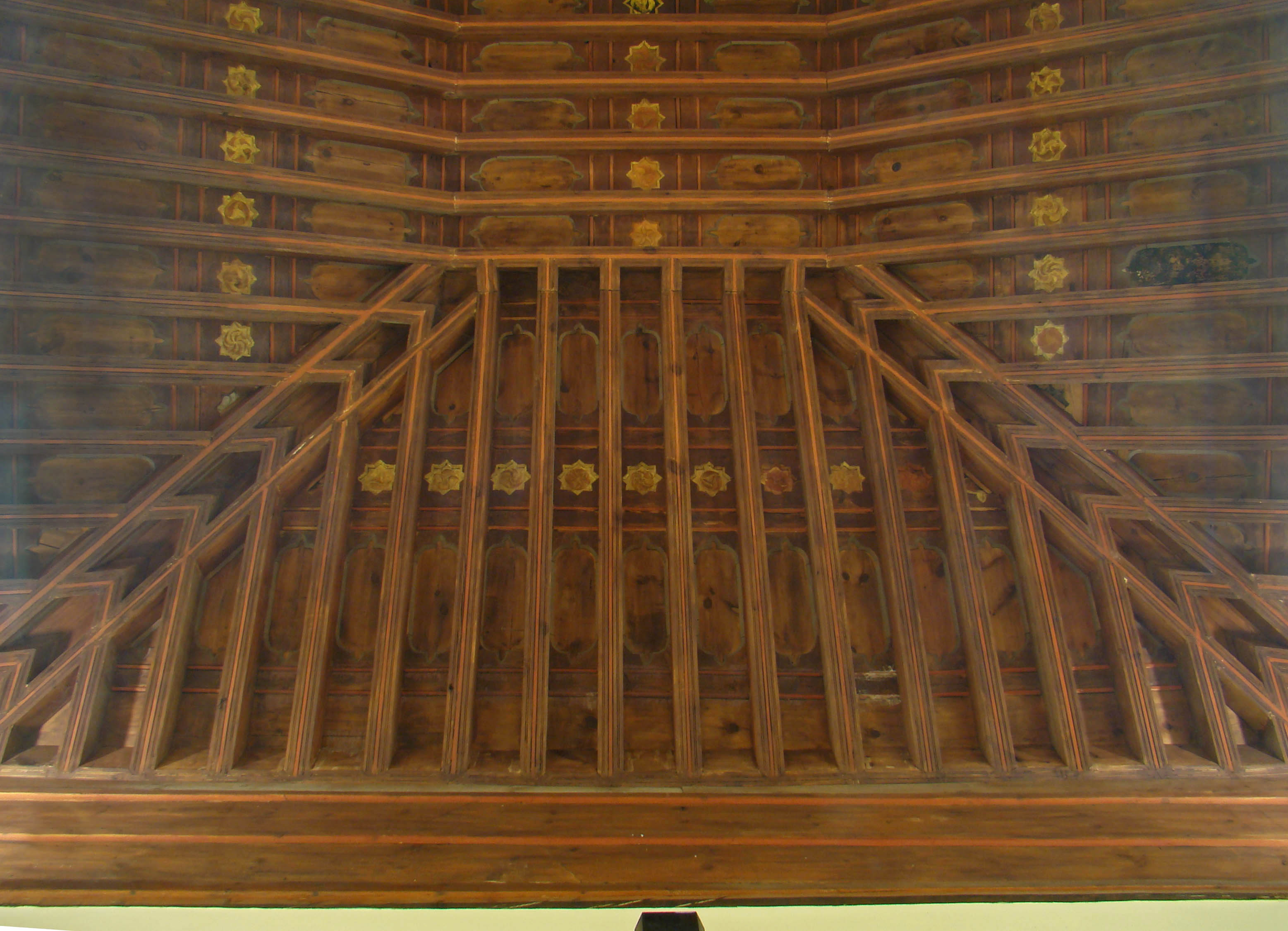 El palacio de los Vivero fue construido a mediados del siglo XV para don Alonso Pérez de Vivero, Contador Mayor de Juan II. En una de sus estancias, la llamada Sala Rica, firmaron compromiso de matrimonio el 14 de octubre de 1469 los Reyes Católicos, uniéndose así las Coronas de Castilla y Aragón. En el siglo XXI alberga el Archivo Histórico Provincial de Valladolid. En la foto se ve un artesonado mudéjar correspondiente a lo que fue Sala Rica actual sala de estudio e investigación.